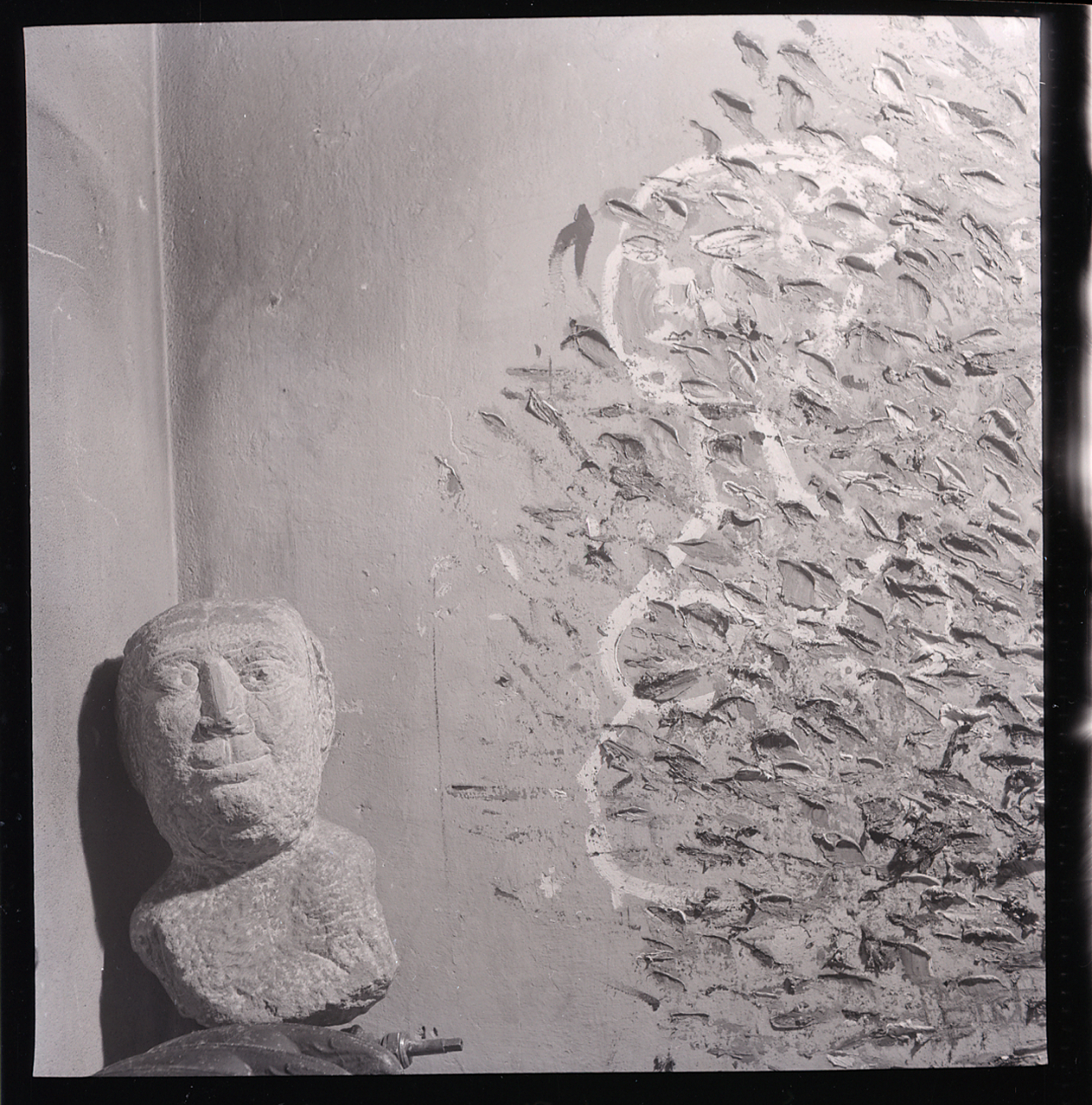 Servizio fotografico : Milano, 1958 / Paolo Monti. - Buste: 1, Fototipi: 1 : Negativo b/n, gelatina bromuro d'argento/ pellicola ; 6x6. - ((Serie costituita da 1 busta di negativo identificato con il n.: 14544. - Sulla busta iscrizione didascalica manoscritta a pennarello: "Studio/ Cassinari".